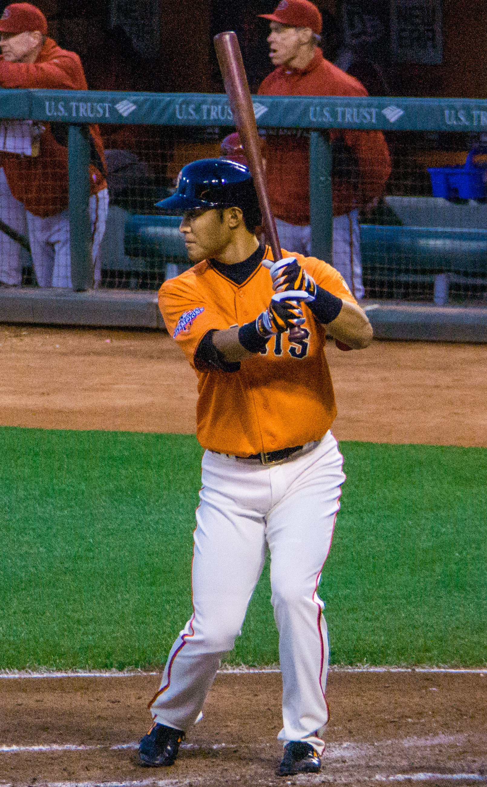 Kensuke Tanaka